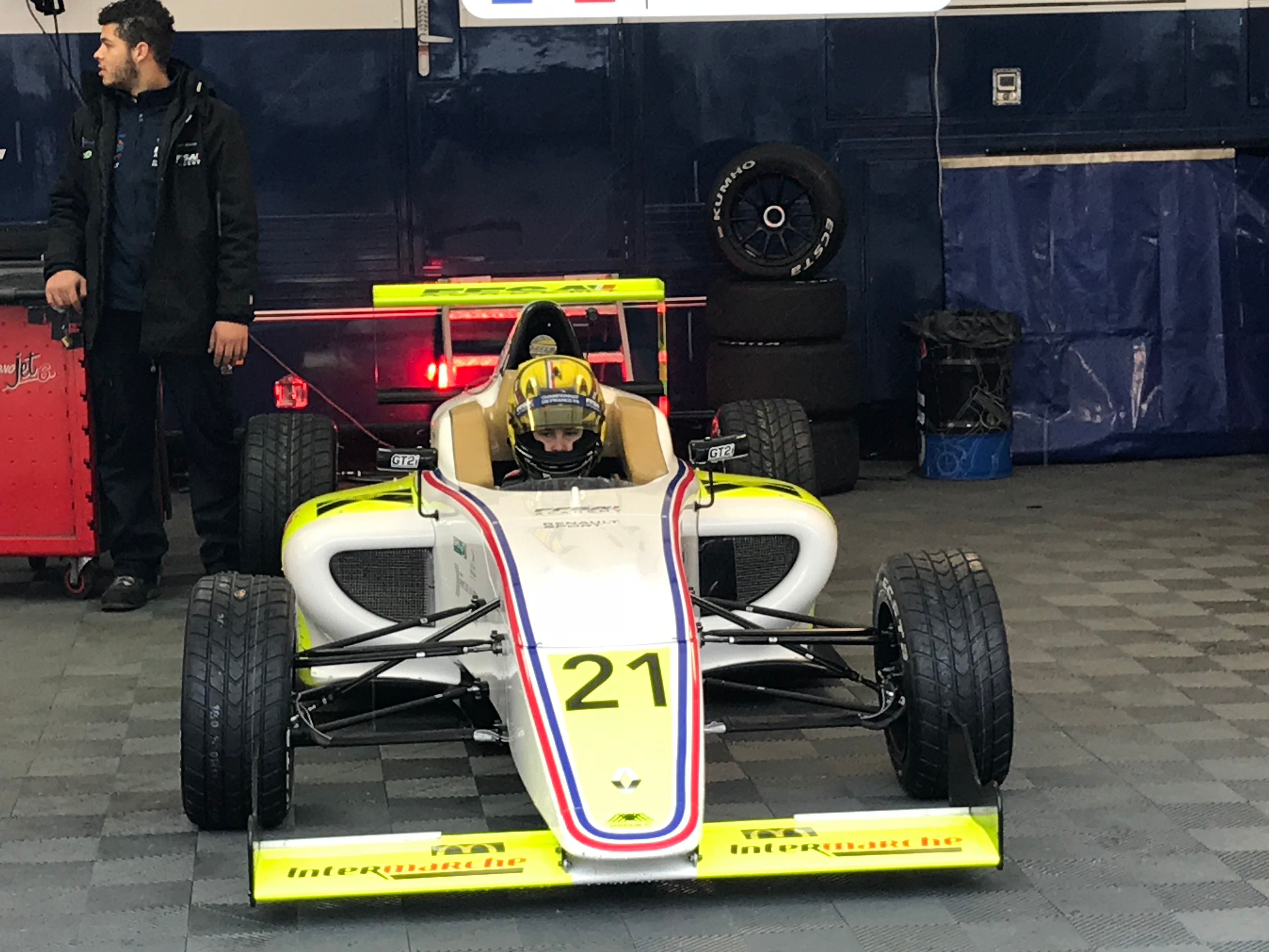 Théo Pourchaire en championnat de France de Formule 4 en 2018.